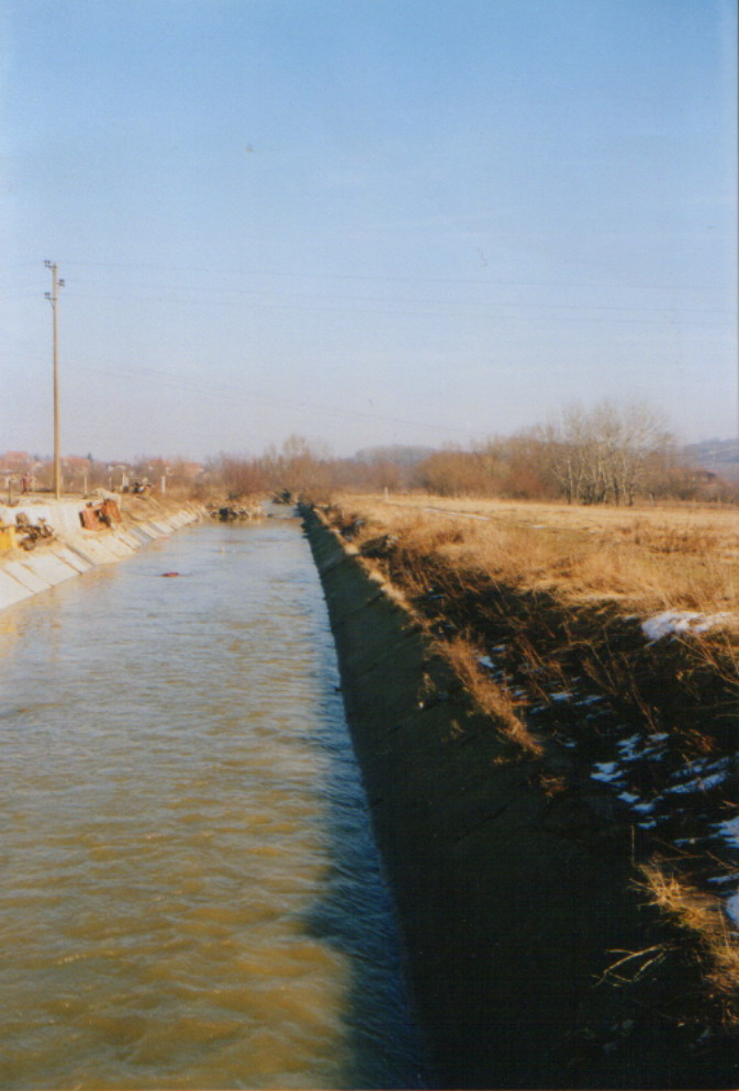 Bolečica river/La rivière Bolečica, Serbie